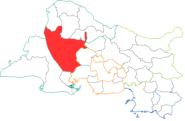 Situation du canton dans le département des Bouches-du-Rhône (France)